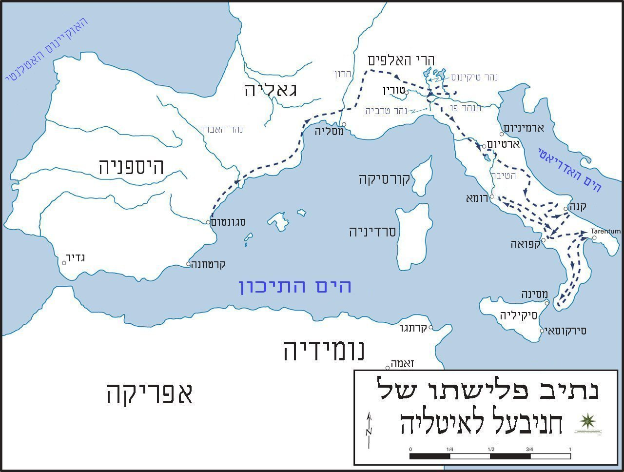 נתיב פלישתו של חניבעל לאיטליה